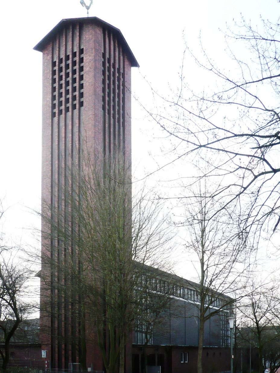 St._Michael in Essen-Huttrop